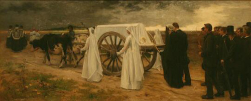 Enterrement d’une jeune fille à Etricourt - tableau de Georges Paul François Laurent Laugée